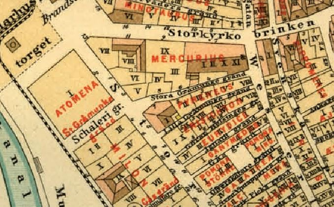 Del av Lundgrens karta över Stockholm visande kvarteren Mercurius, Atomena, Milon, Minotaurus m.fl.